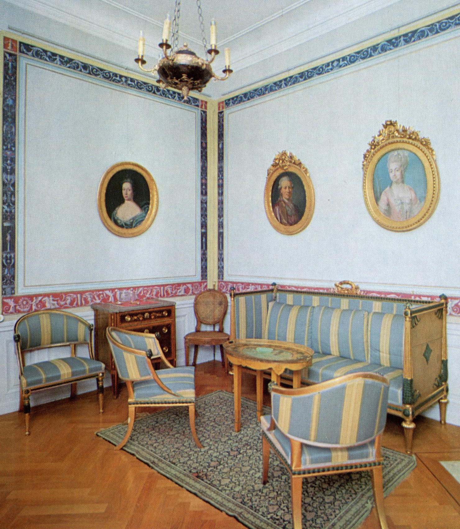 Östanå slott, Empirsalongen